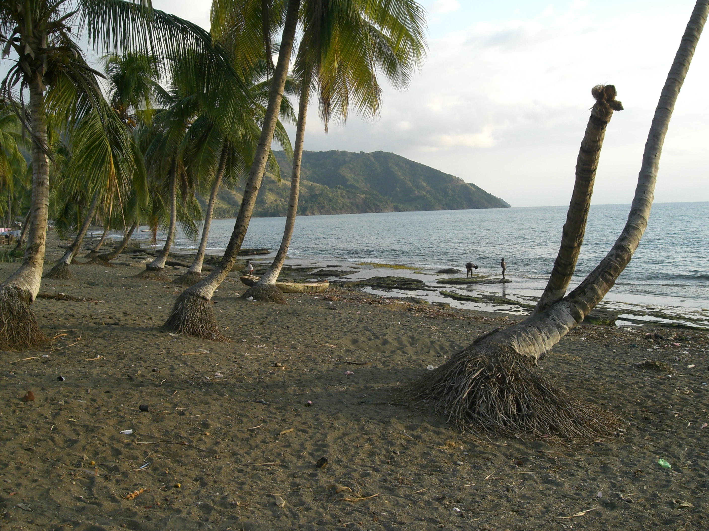 Les Irois, Haiti